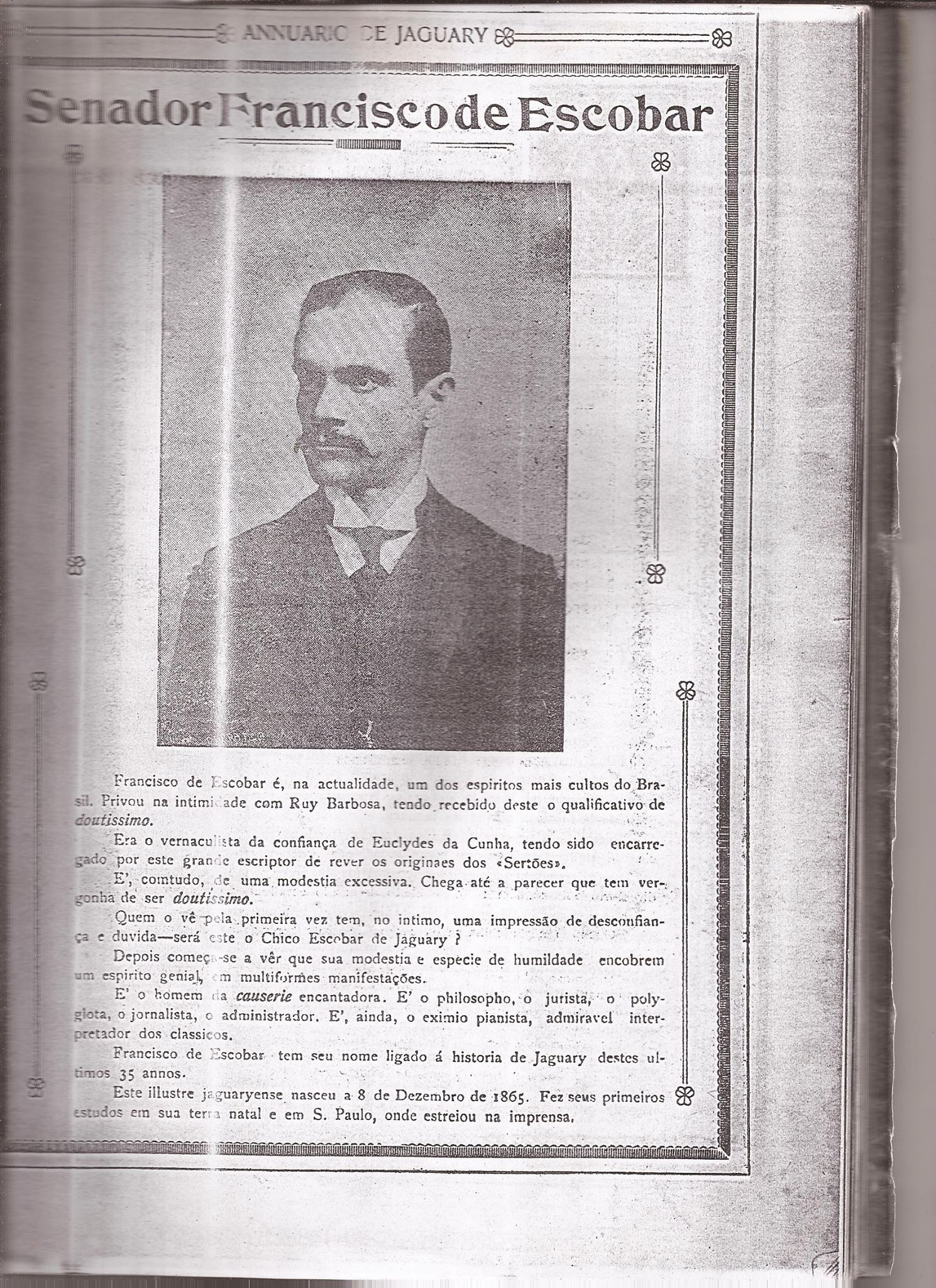 Vida de Francisco Escobar no Annuario de Jaguary